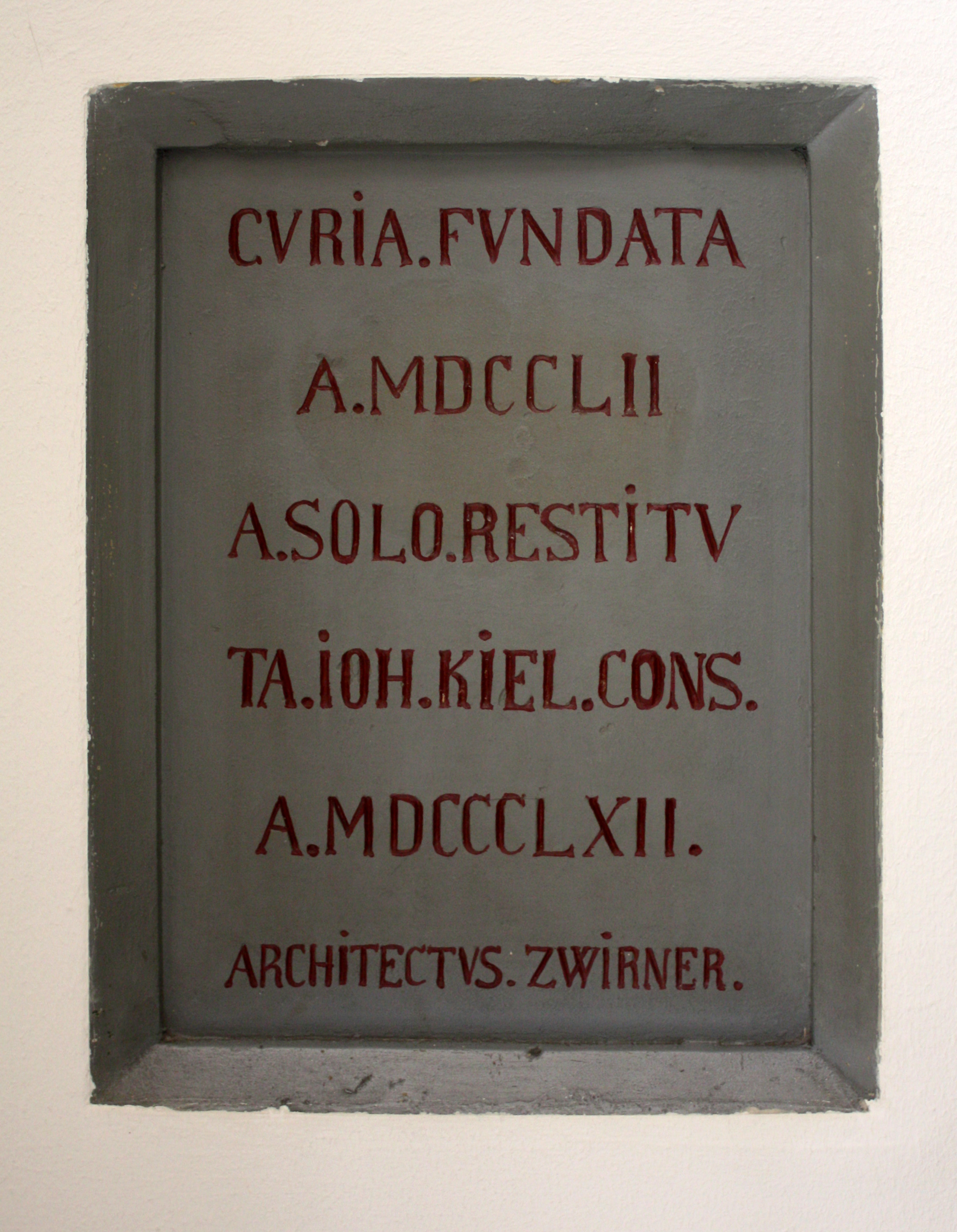 Lechenich, Rathaus. Grundstein- Gedenkplatte 1862